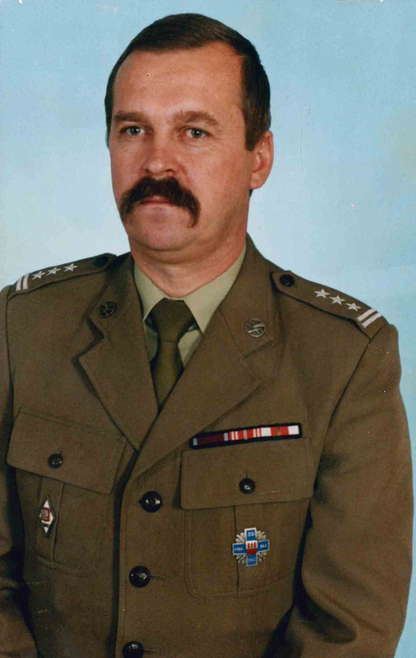 Dowódca Garnizonu Przasnysz 2004, jednocześnie dowódca JW 5966 - płk Waldemar Trochimiuk (2003 - 2006)